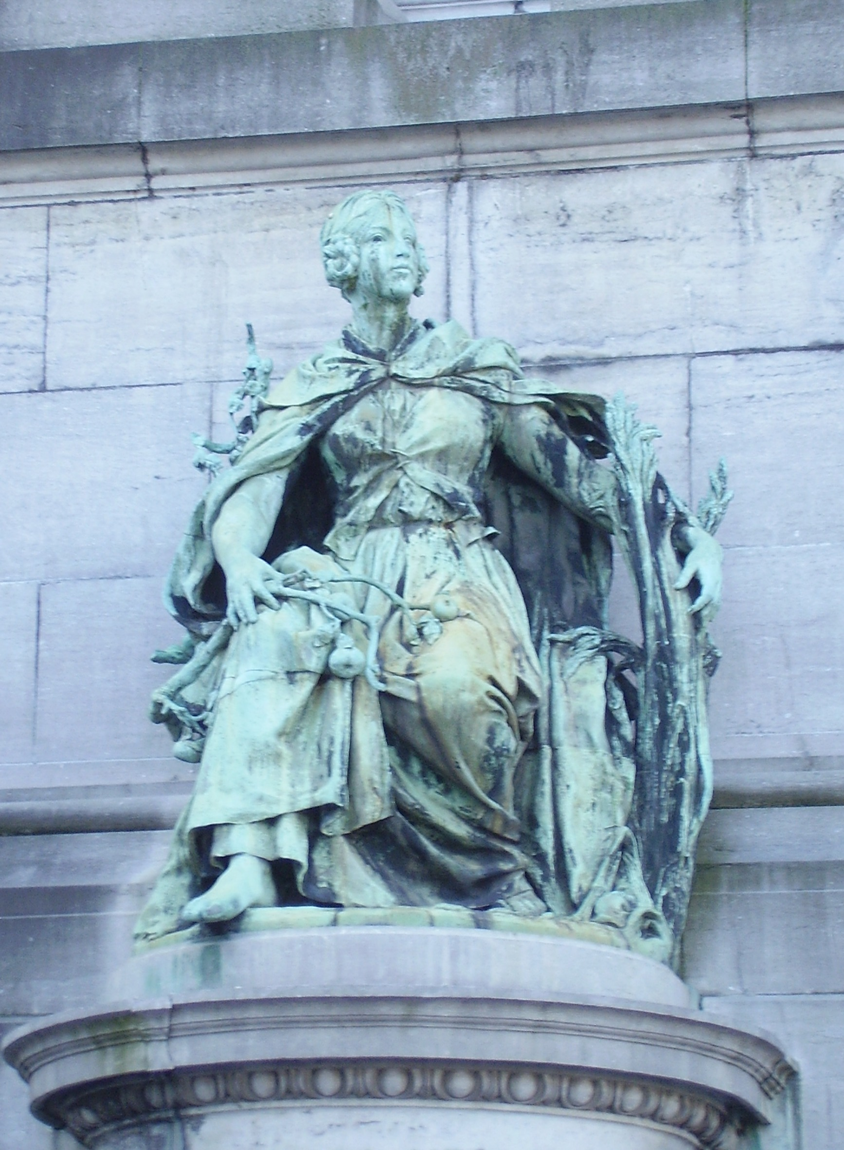 Arcades du Cinquantenaire, Bruxelles - Province de Limbourg par Albert-Constant Desenfans